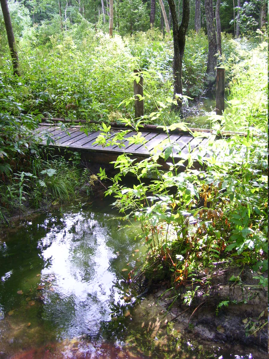 Partsi oja (Pühalepa vald, Hiiumaa), Suuresadama ja Kõlunõmme külade vahelise metsateega ristumisel